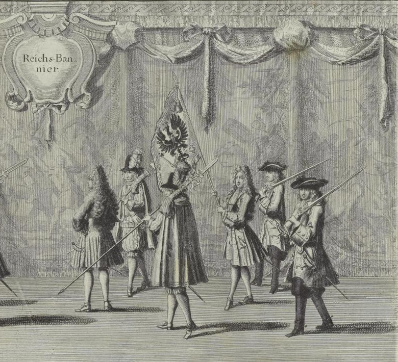 Der Königlich-Preüßischen Crönung Hochfeÿerliche Solemnitäten, Blatt 15, Ausschnitt Reichs-Bannier Herr Graf von Dohna mit dem Reichs-Bannier